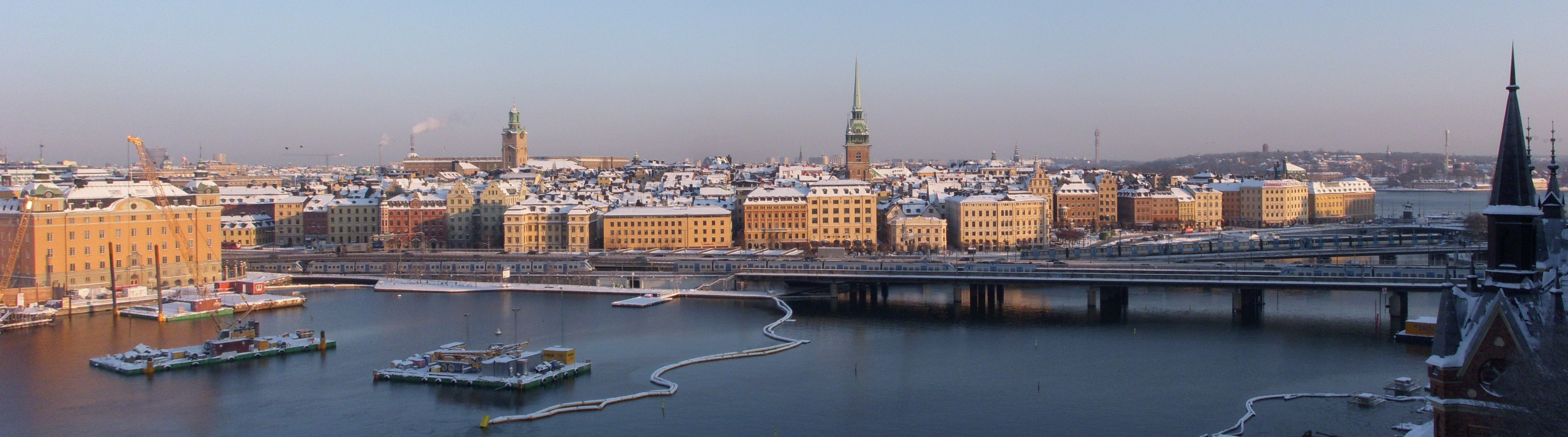 Vy över Gamla stan från Monteliusvägen